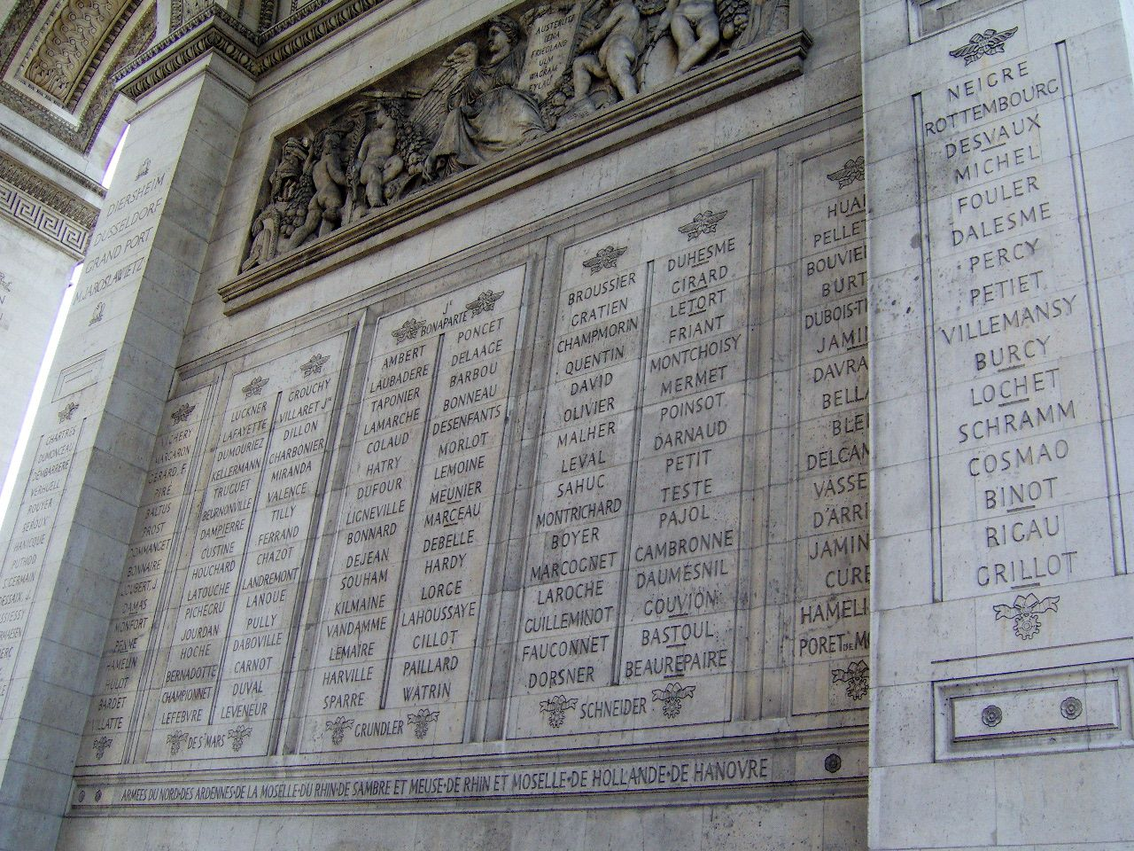 Arc de Triomphe